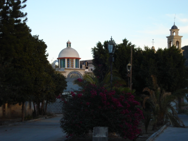 Cardenas San Luis Potosi Mexico.